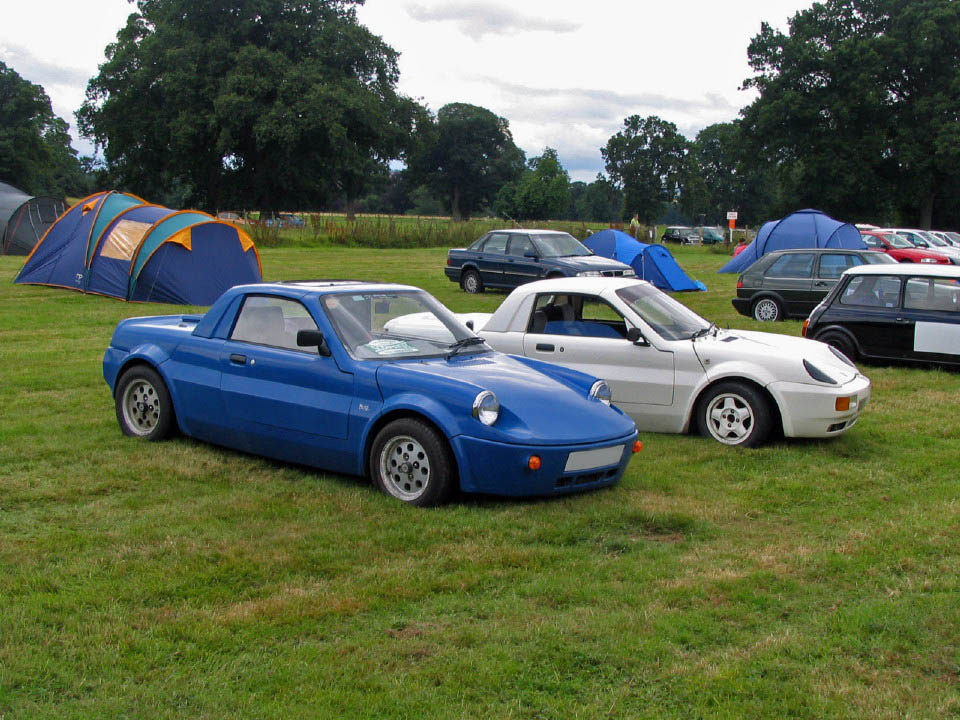 GTM Rossa